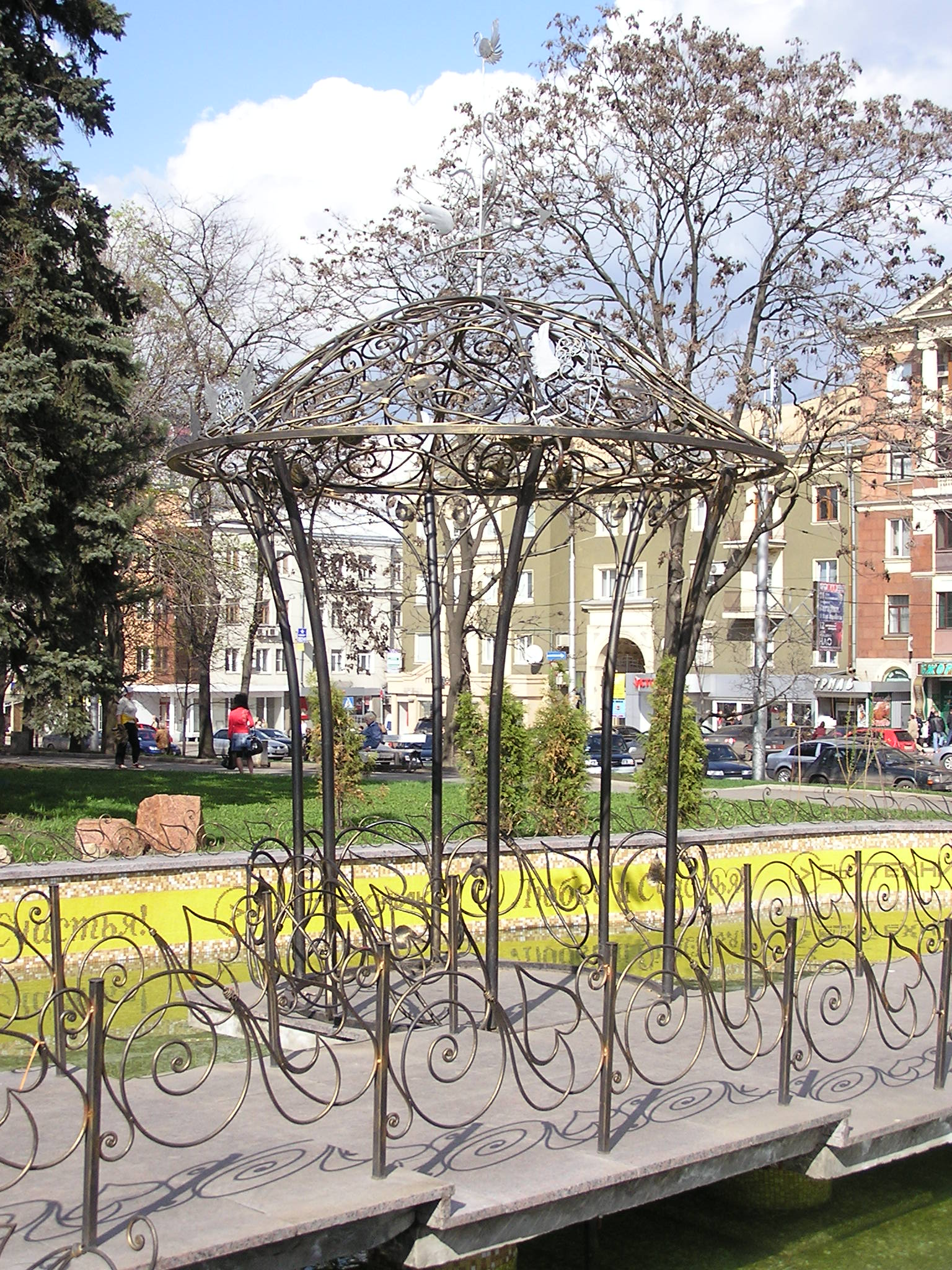 Донецк. Беседка влюблённых